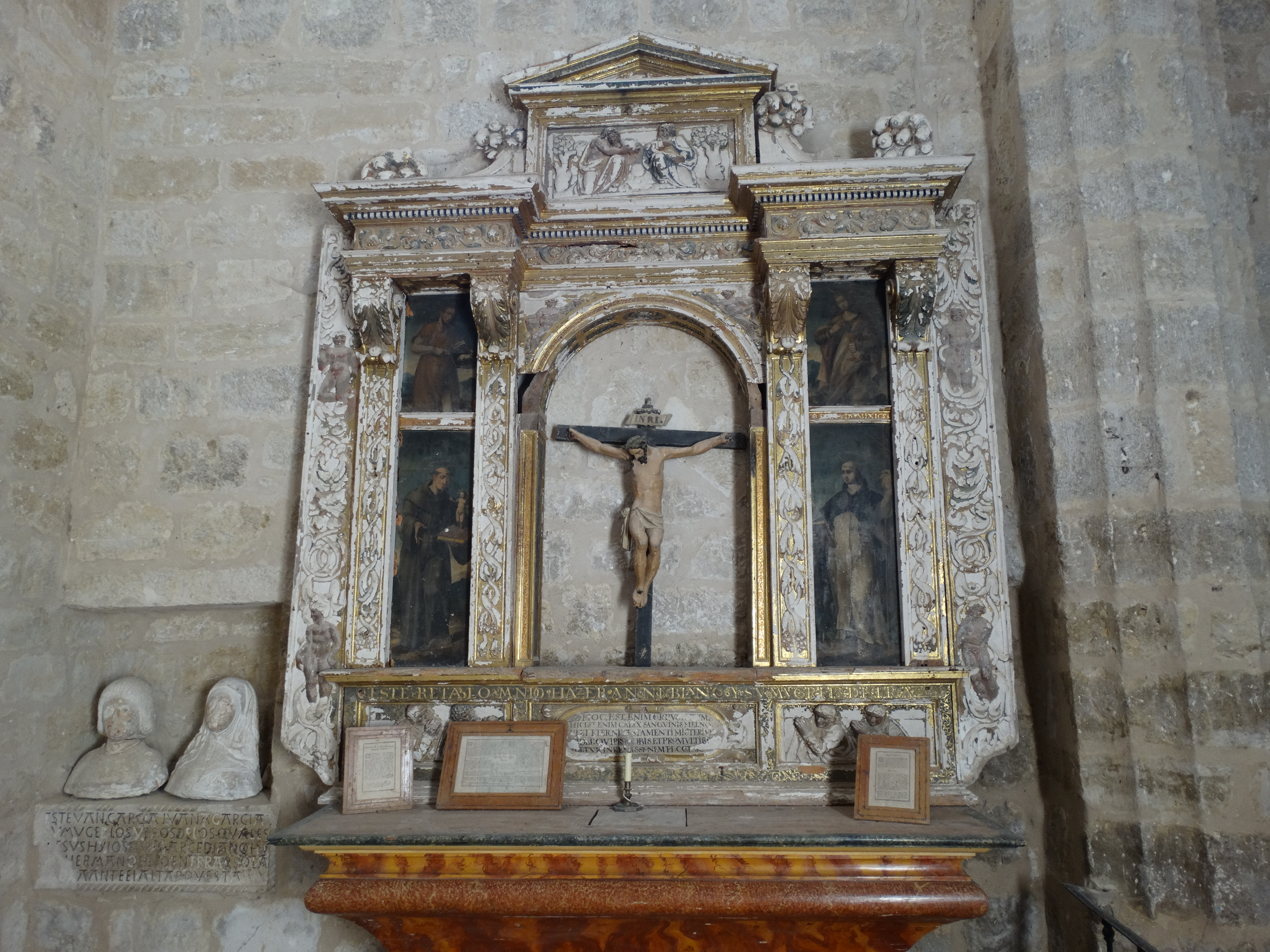 Torremormojón, provincia de Palencia, España. Iglesia de Santa María del Castillo. Capilla enterramiento de los Castro y los Velasco.